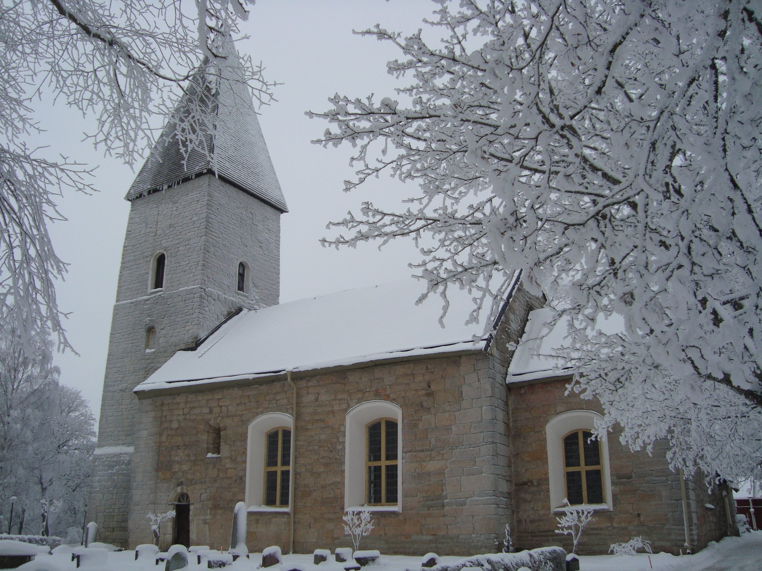 Mosjö kyrka, Närke från sydöst vintern 2010